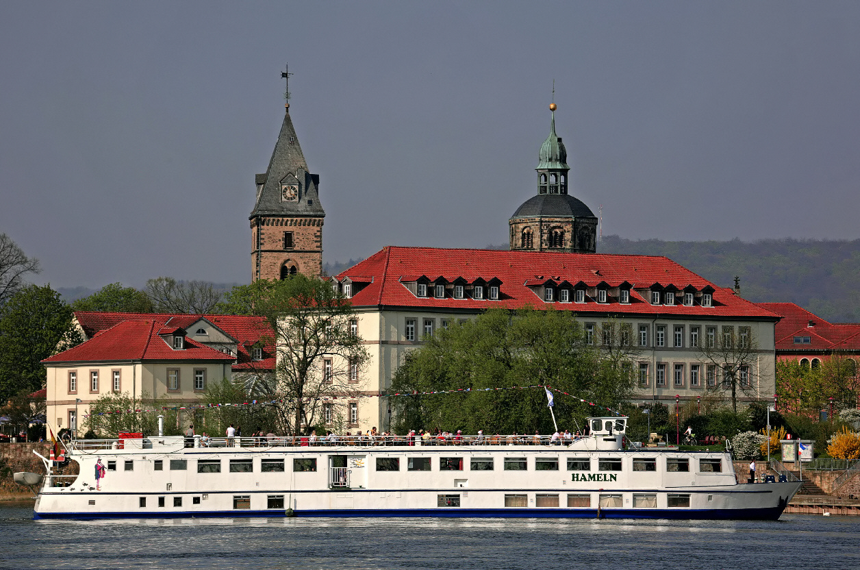 Das Schiff "Hameln" der Flotte Weser am Schiffsanleger in Hameln vor dem Hotel "Stadt Hameln" und der Münsterkirche.